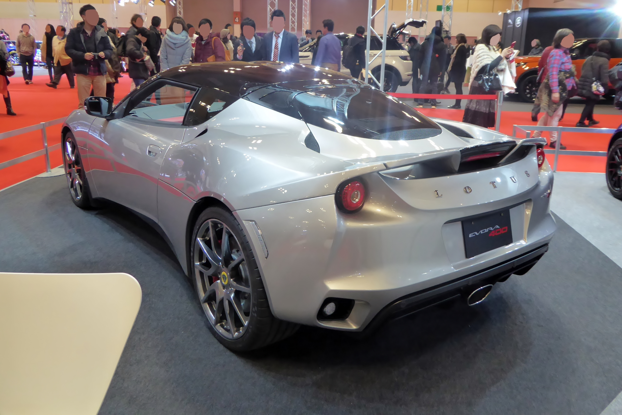 大阪モーターショー2015においてロータス・エヴォーラ400を撮影。